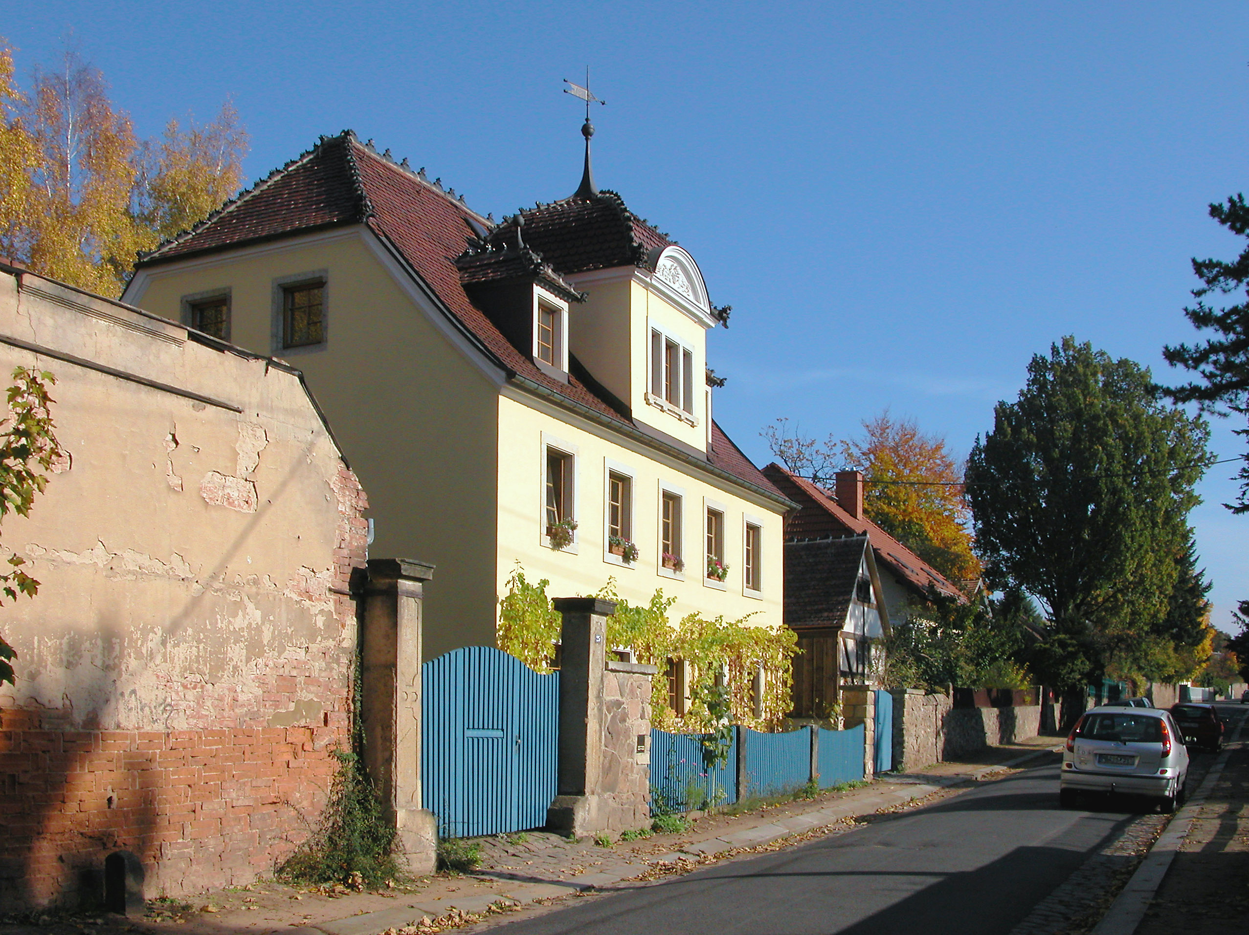 27.10.2005 01445 Radebeul-Oberlößnitz: Haus Eisold, Weingut Bennostraße 25 (GMP: 51.109351,13.669280). Erbaut zwischen 1730 und 1740, heutiges Aussehen nach Umbau durch Arthur Eisold von 1894. Bis 1999 saniert. [DSCN7973.TIF]20051022010DR.JPG(c)Blobelt